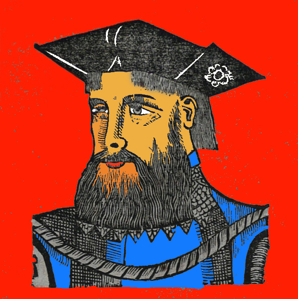 Portrait de Nuno da Cunha, gouverneur de l'Inde Portugaise